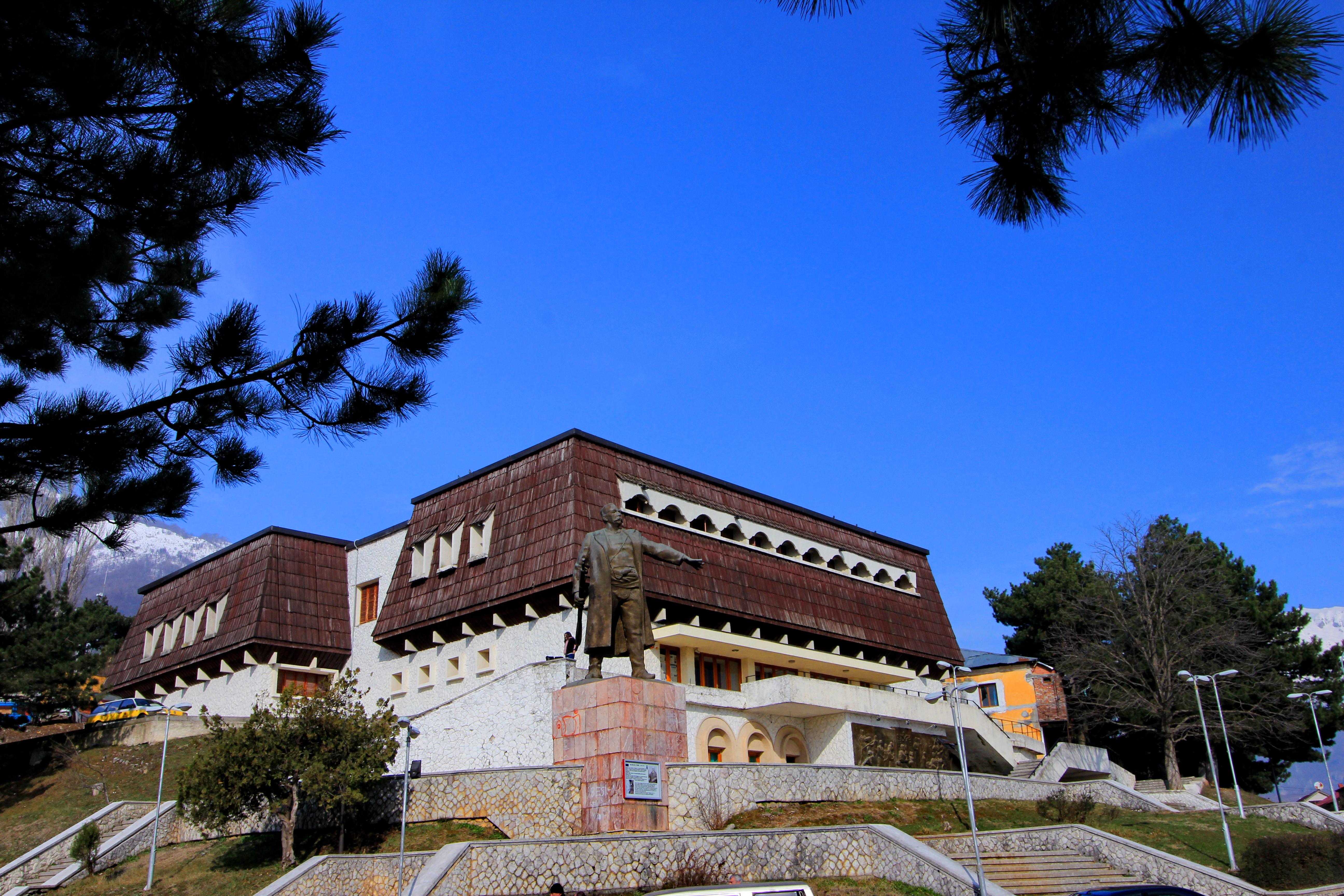 Bajram Curri Panoramë